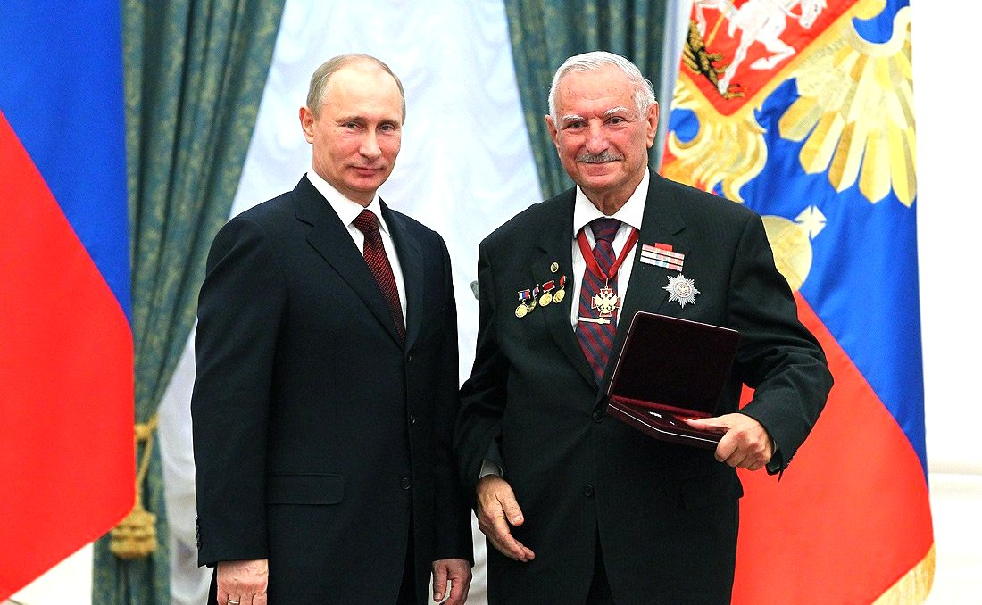 Президент России Владимир Путин награждает званием «Заслуженный деятель науки Российской Федерации» генерального конструктора ОАО «Московский научно-исследовательский институт «Агат» Иосифа Акопяна. 22 февраля 2013 года.